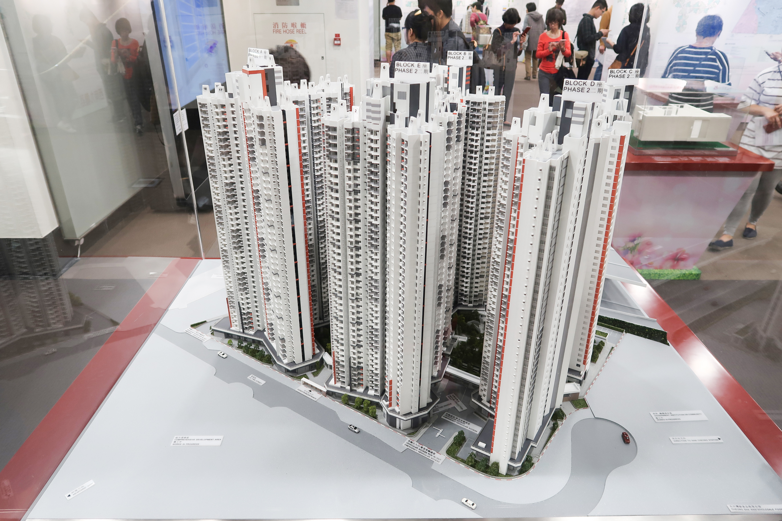 Hoi Lok Court Model